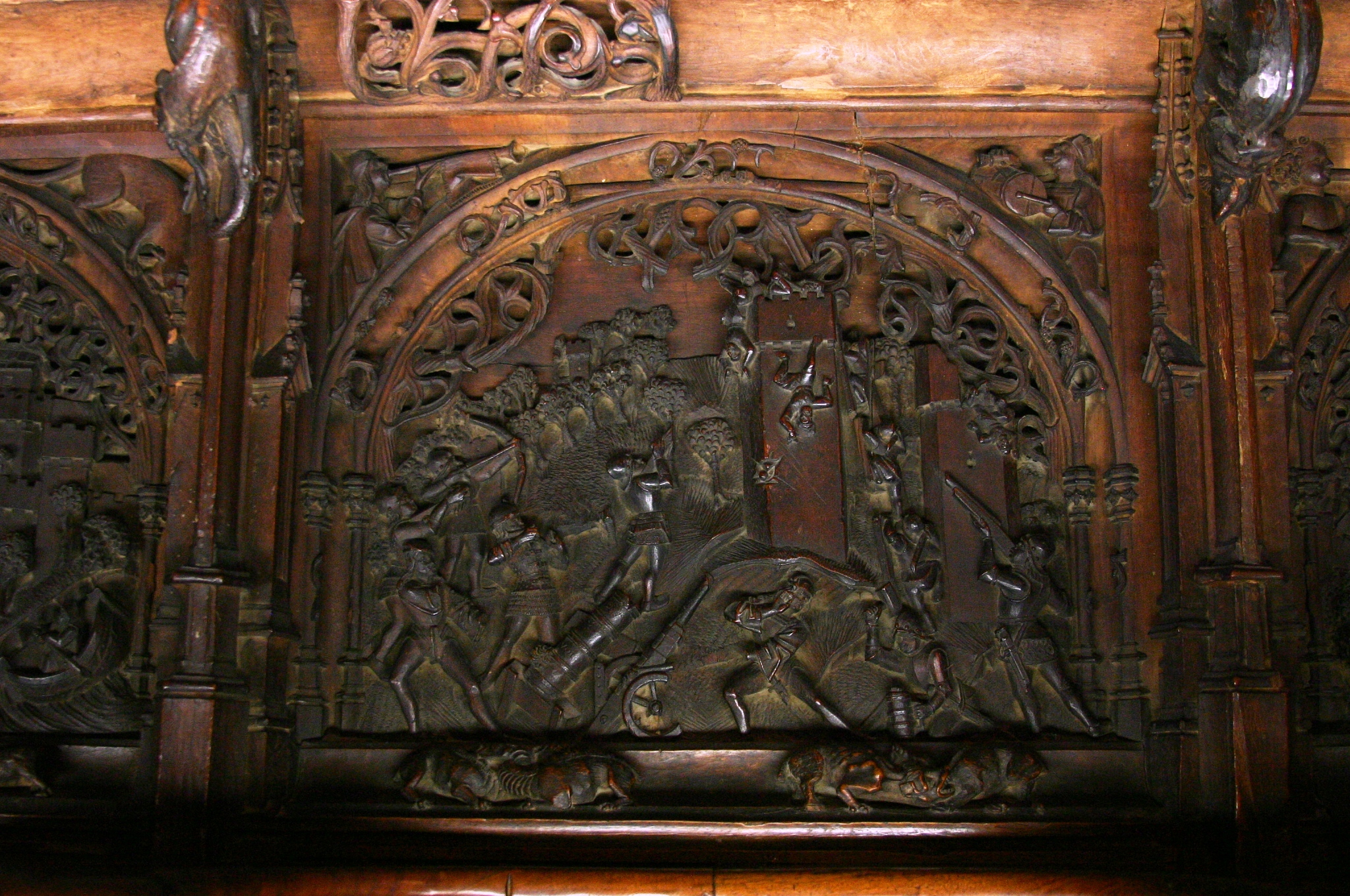 Cadeira no Coro